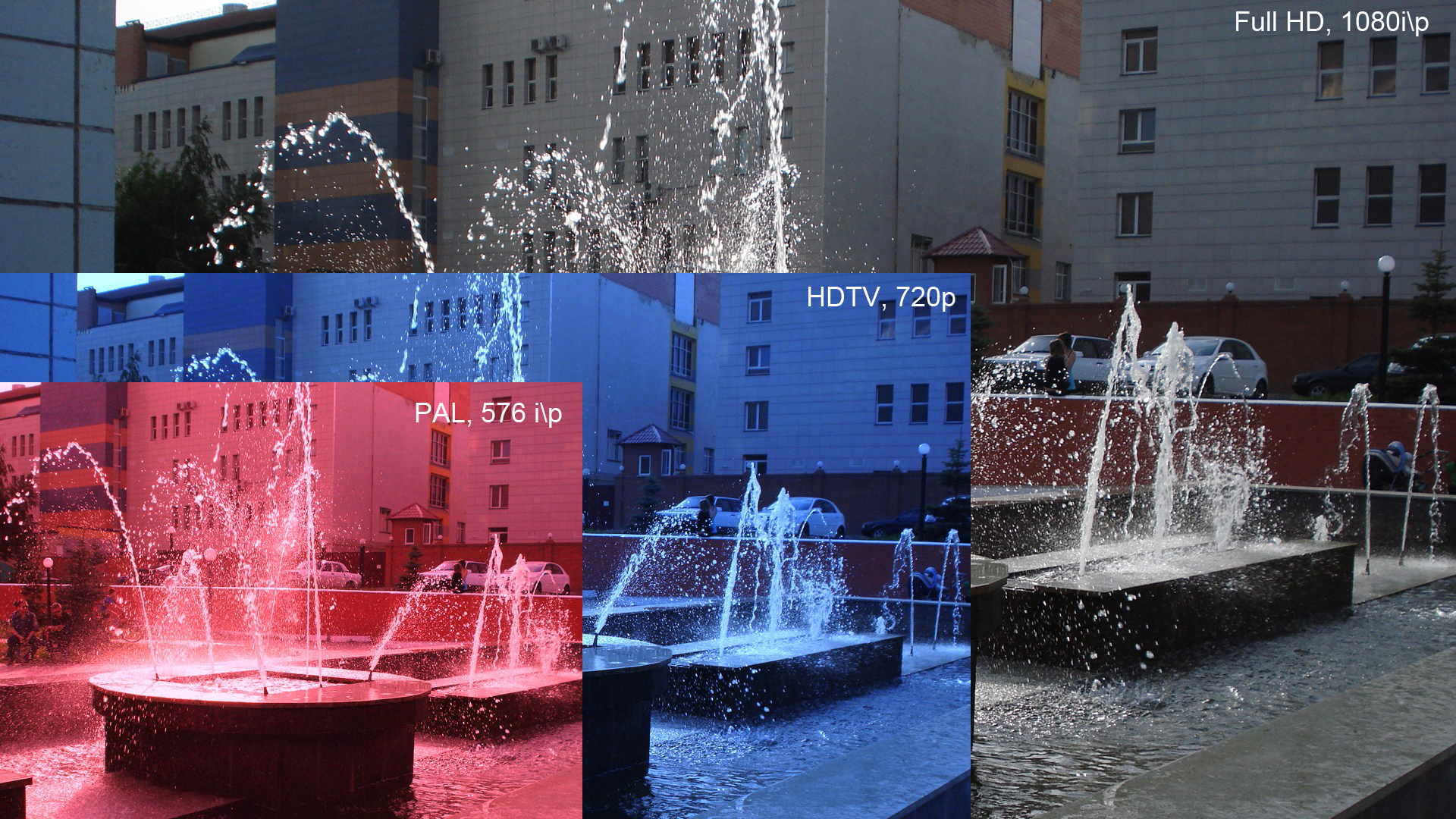 Сравнение изображений в разных стандартах телевизионного вещания.